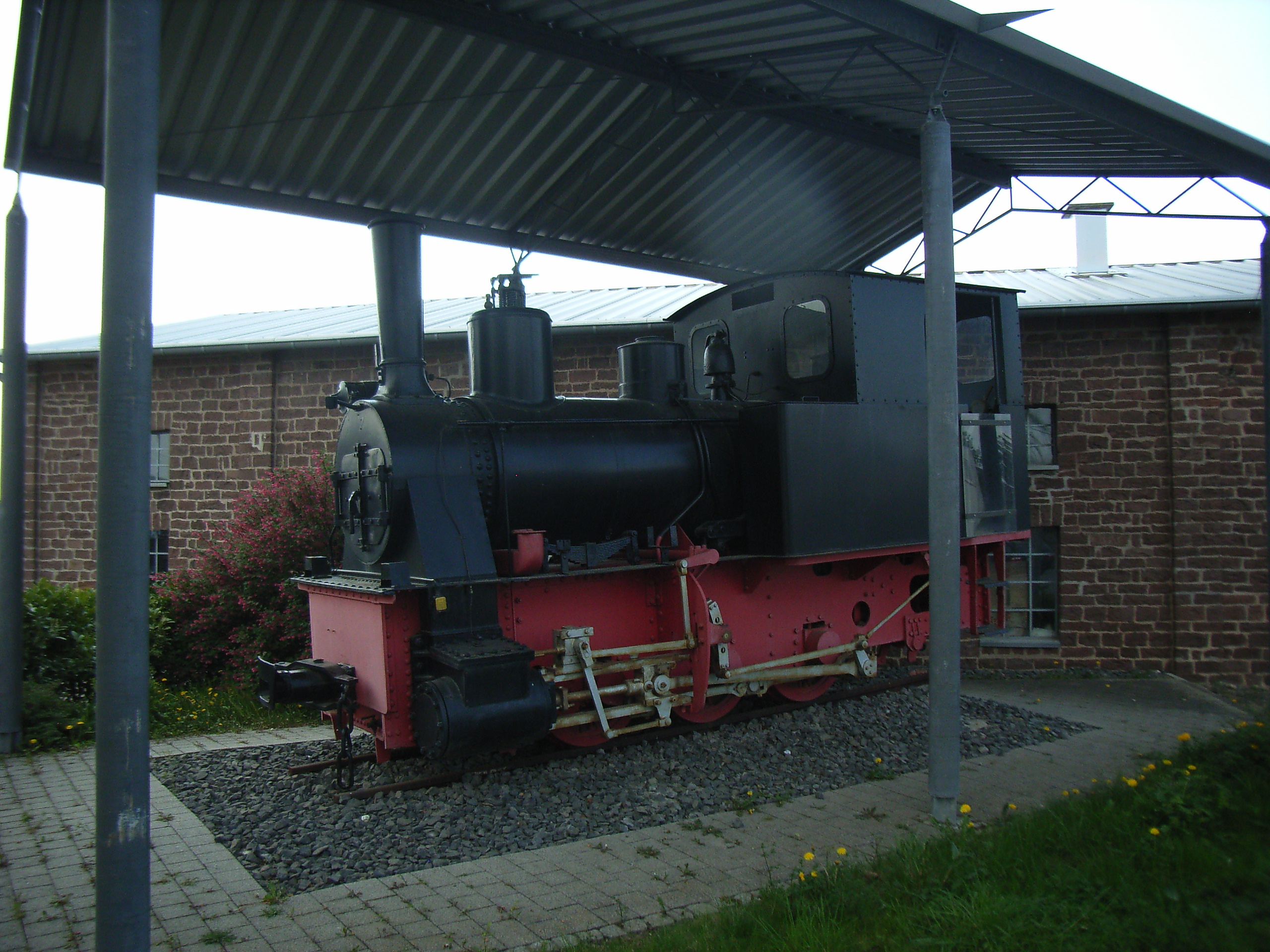 Lok 2 der Kleinbahn Philippsheim - Binsfeld, Baujahr 1899, Spurweite 750 mm